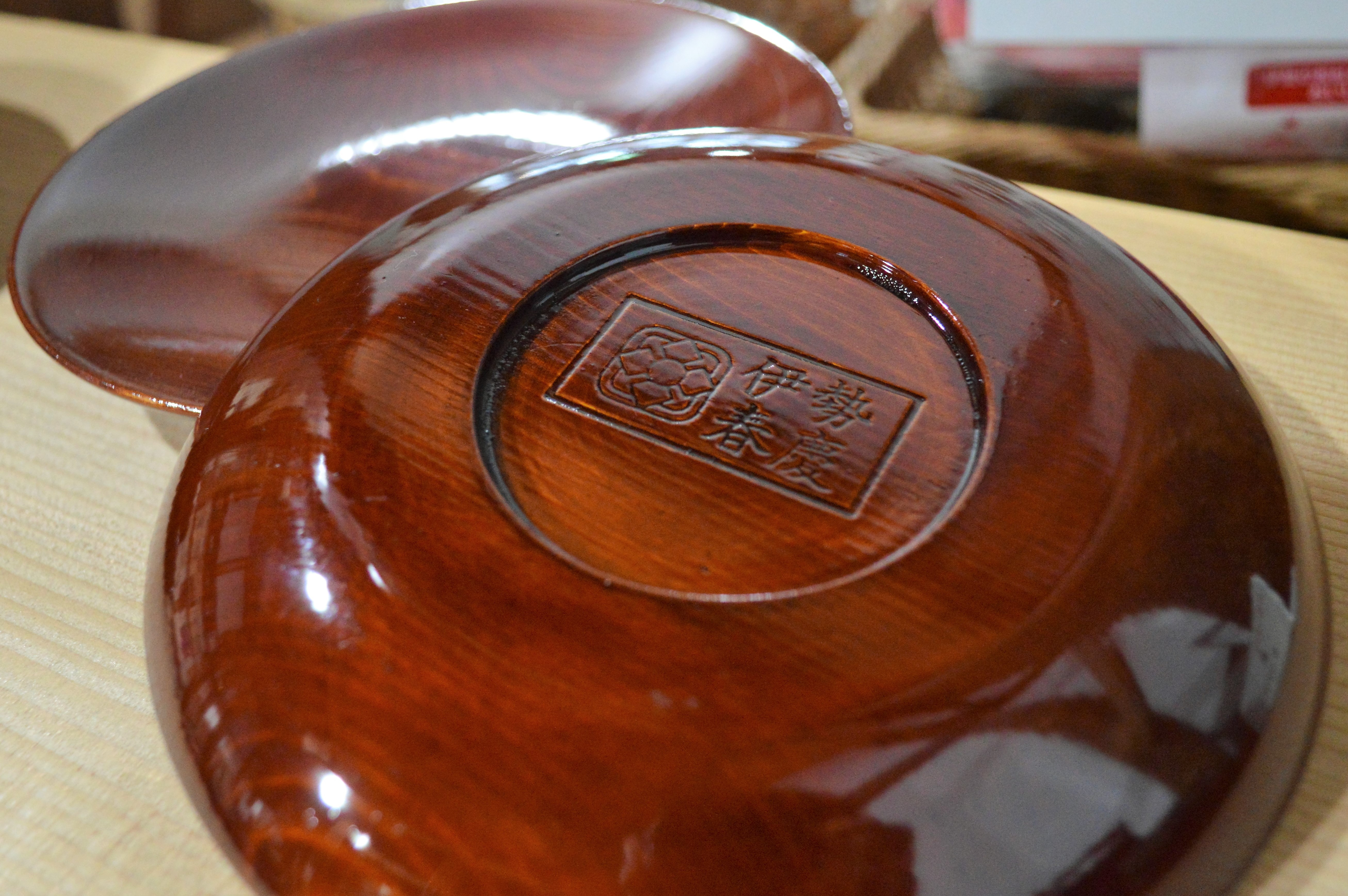 伊勢河崎商人館の商人蔵カフェに陳列されている伊勢春慶。伊勢春慶の会が販売しており、オリジナルの焼印が押されている。許可を得て撮影。